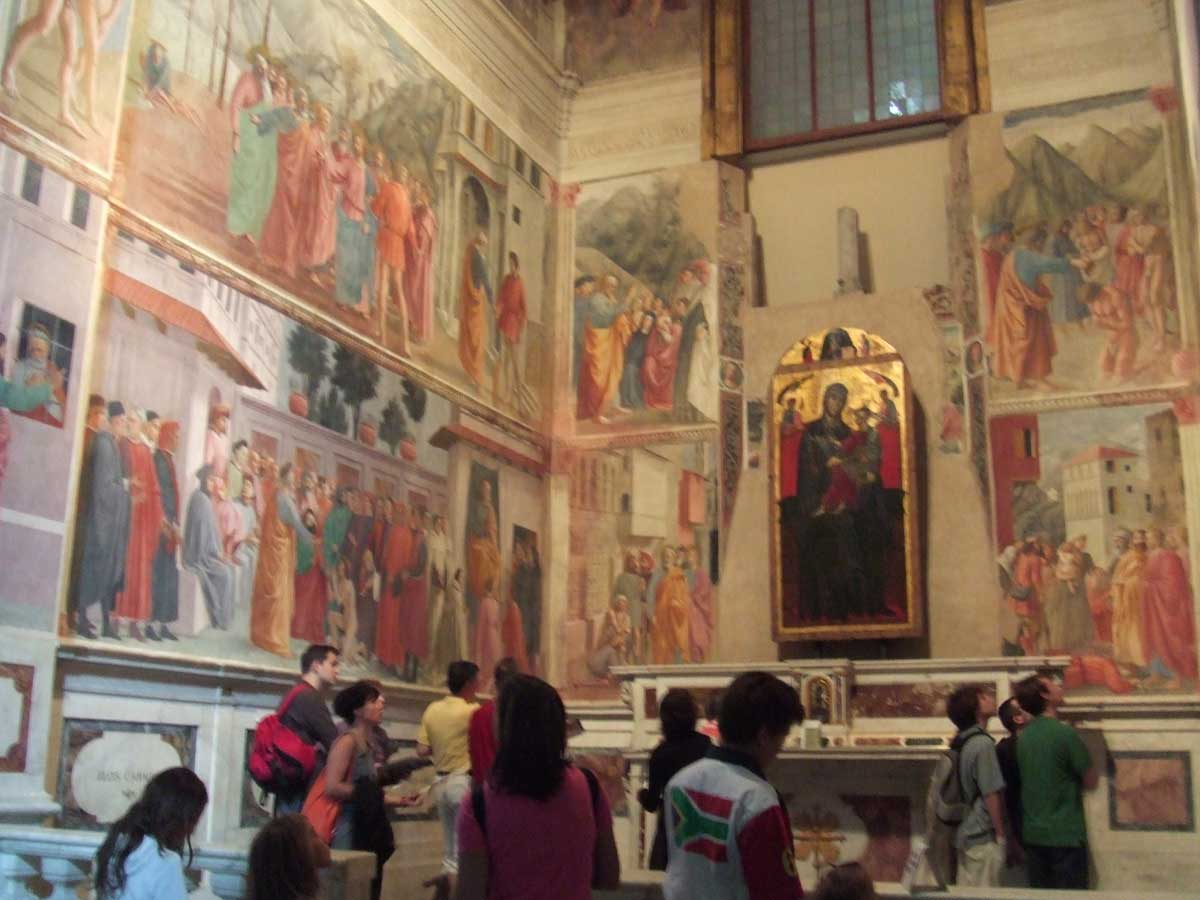 Vue des fresques de la chapelle Brancacci, église Santa Maria del Carmine (Florence)